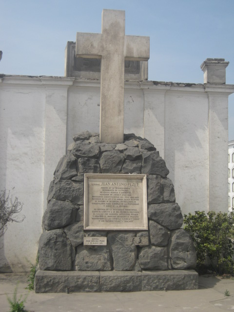 Tumba Jose Antonio Pezet